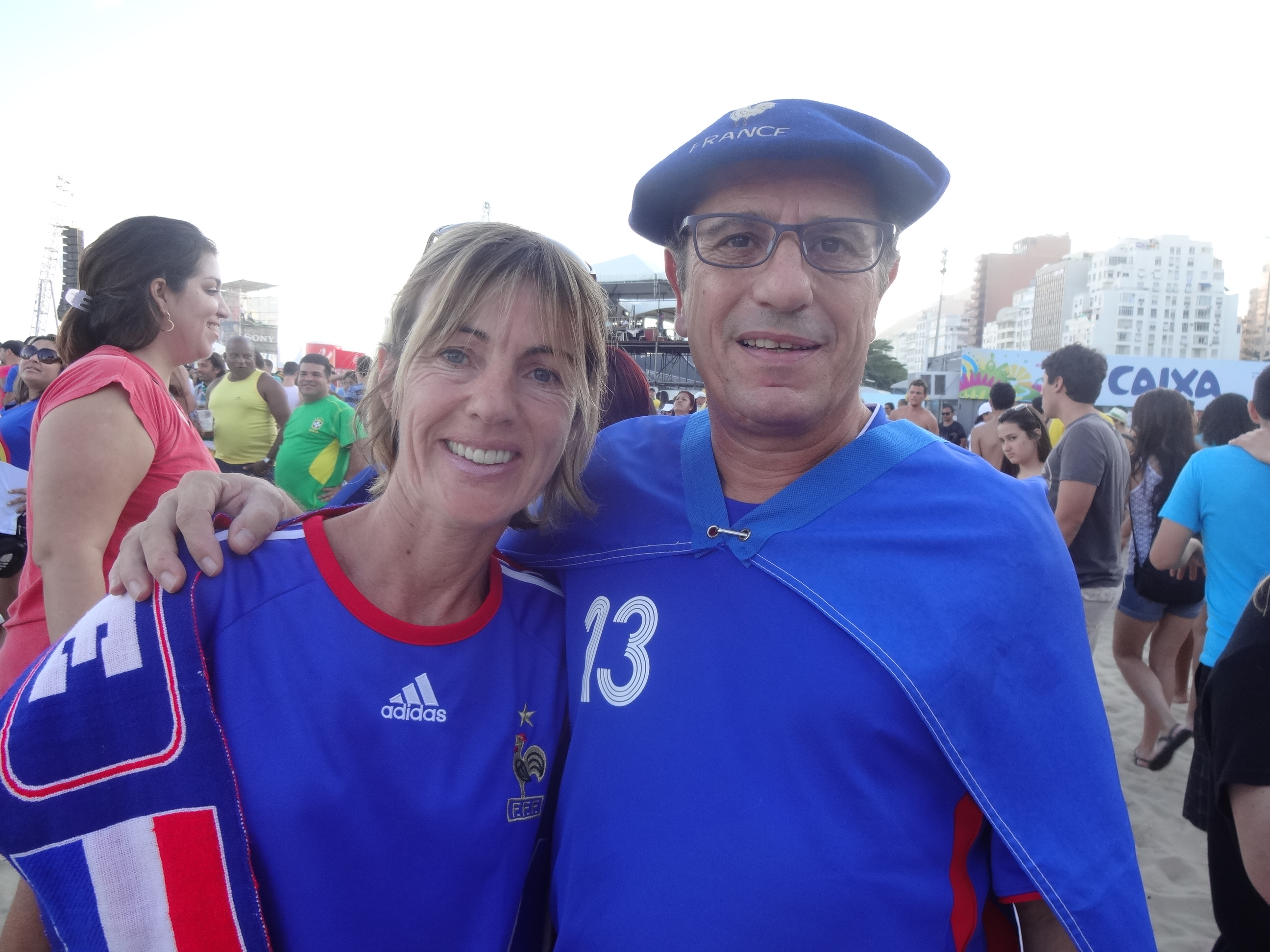 FIFA Fan Fest ultrapassa o total de 400 mil visitantes